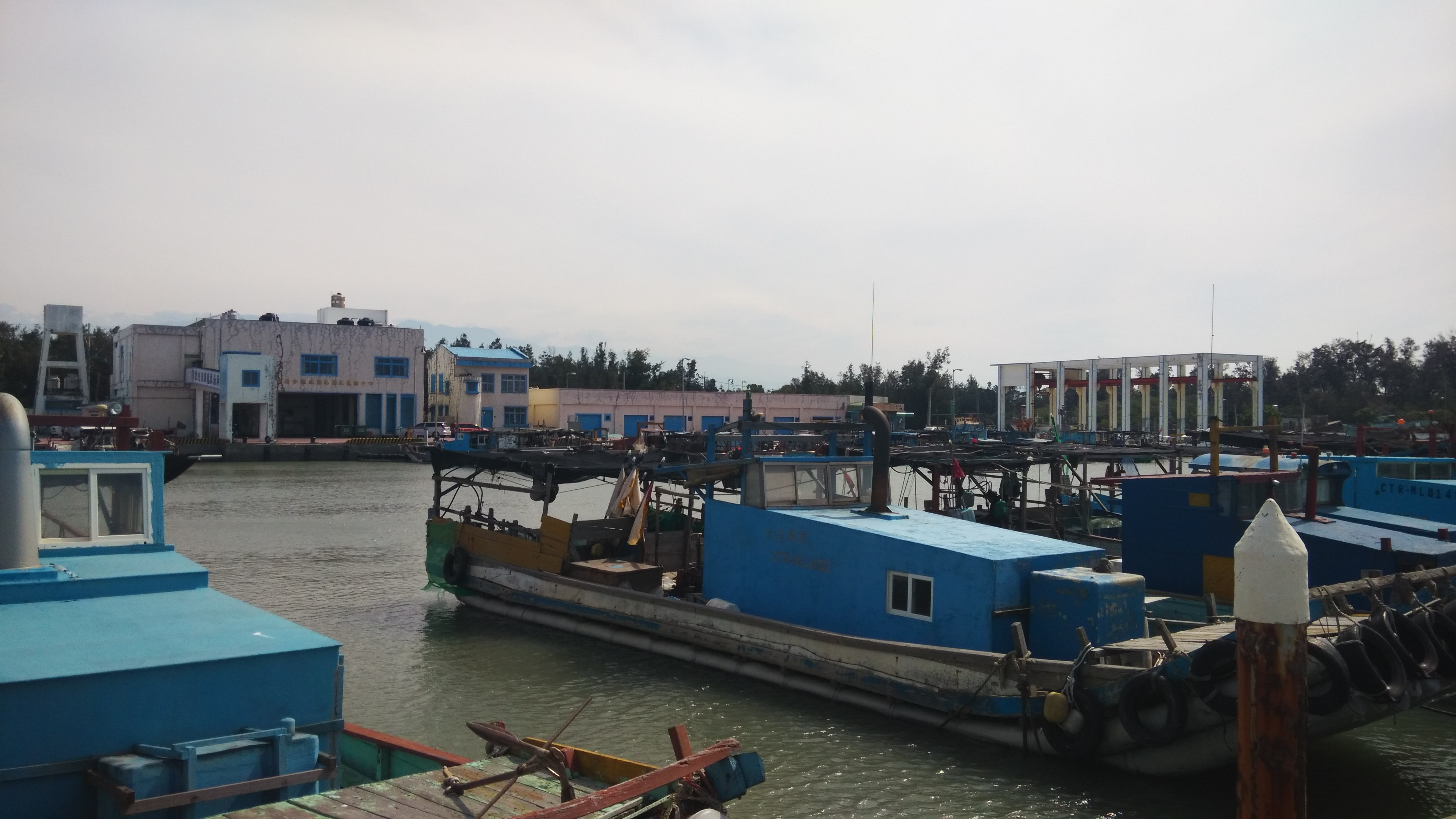 中文（台灣）: 龍鳳漁港一景